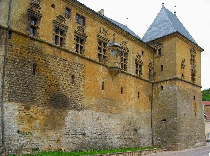 Chateau de Cons-la-Granville (Meurthe-et-Moselle, France)